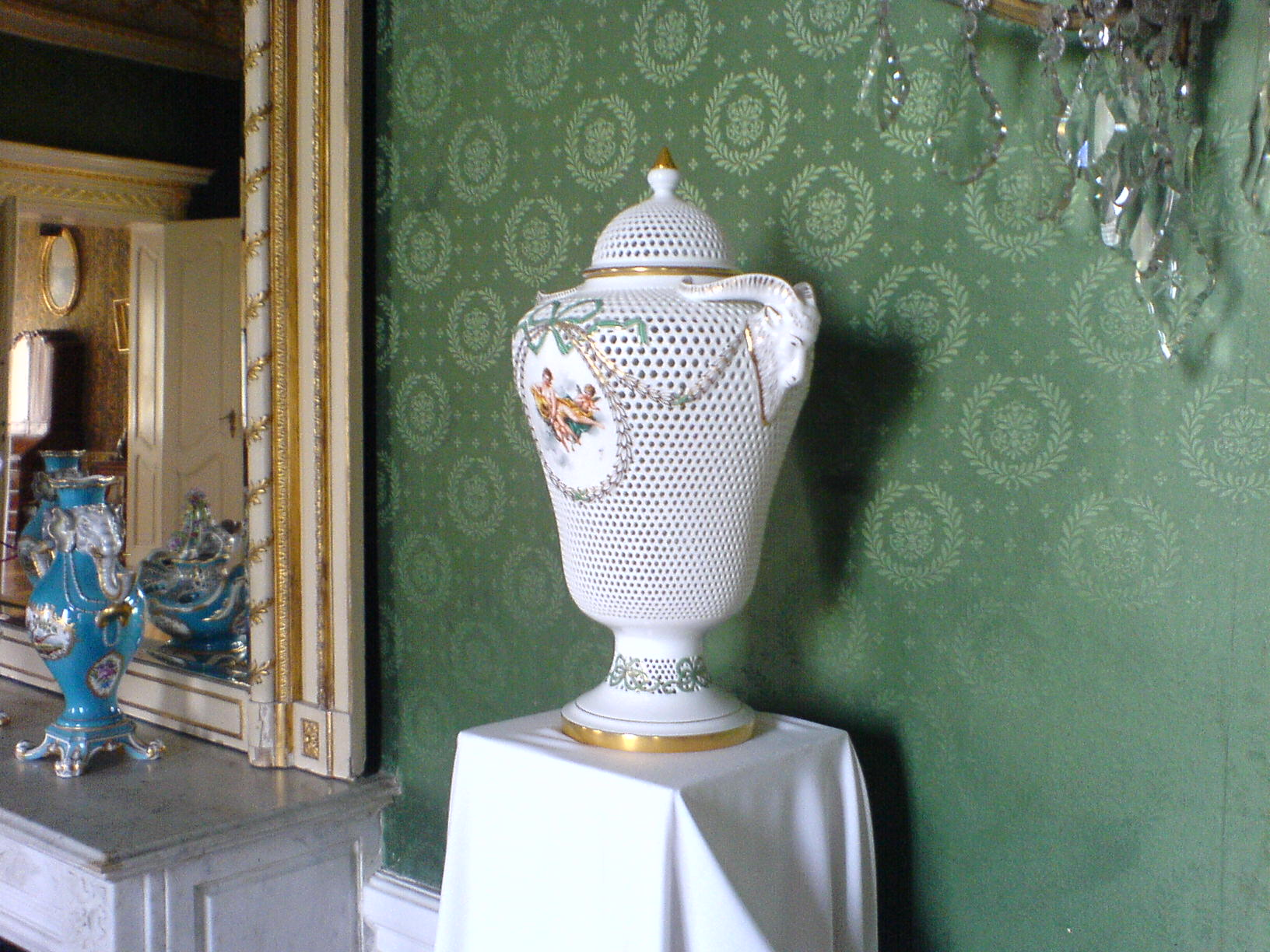 Festetics-kastélyegyüttes – kastélymúzeum This is a photo of a monument in Hungary. Identifier: 10876